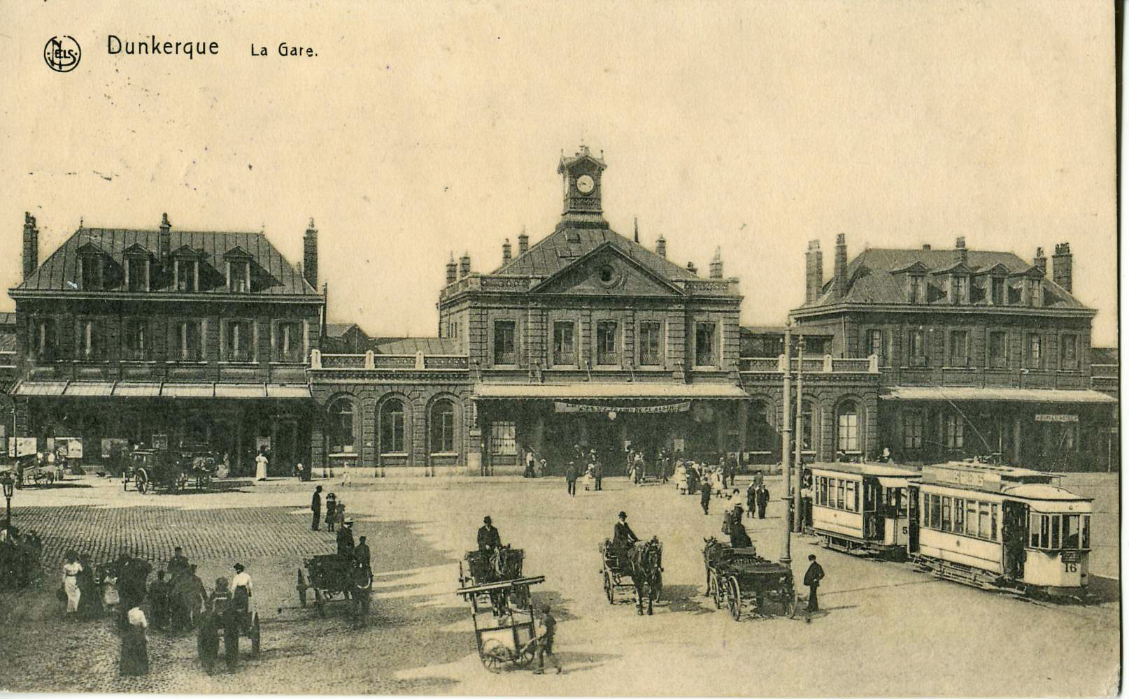 Carte postale ancienne éditée par Nels :DUNKERQUE - La GareVue d'une rame du tramway de Dunkerque